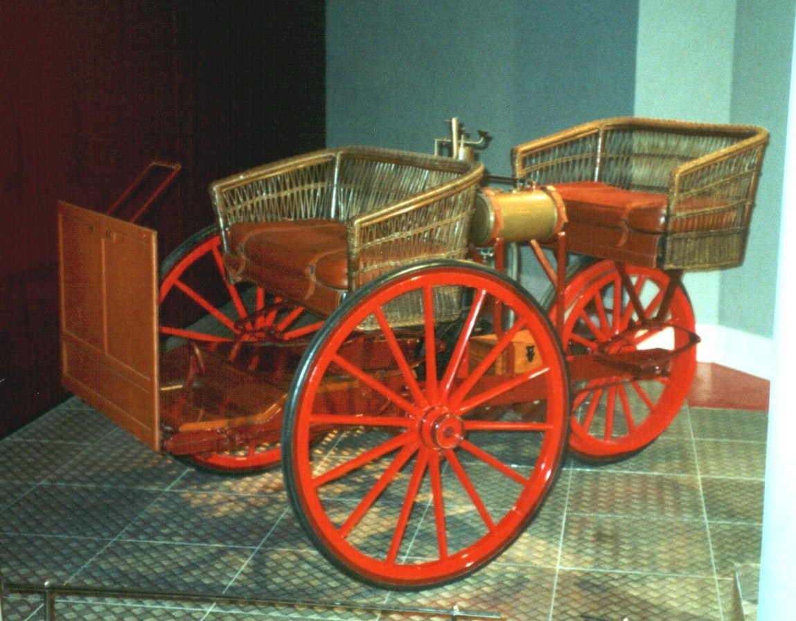 Bonet Unico 1889 Museo de Historia de la Automoción de Salamanca Native nameMuseo de Historia de la Automoción (Salamanca)LocationSalamanca, (Spain)Coordinates40° 57′ 29.73″ N, 5° 40′ 00.95″ W Established2002Web page control : Q6034050 institution QS:P195,Q6034050